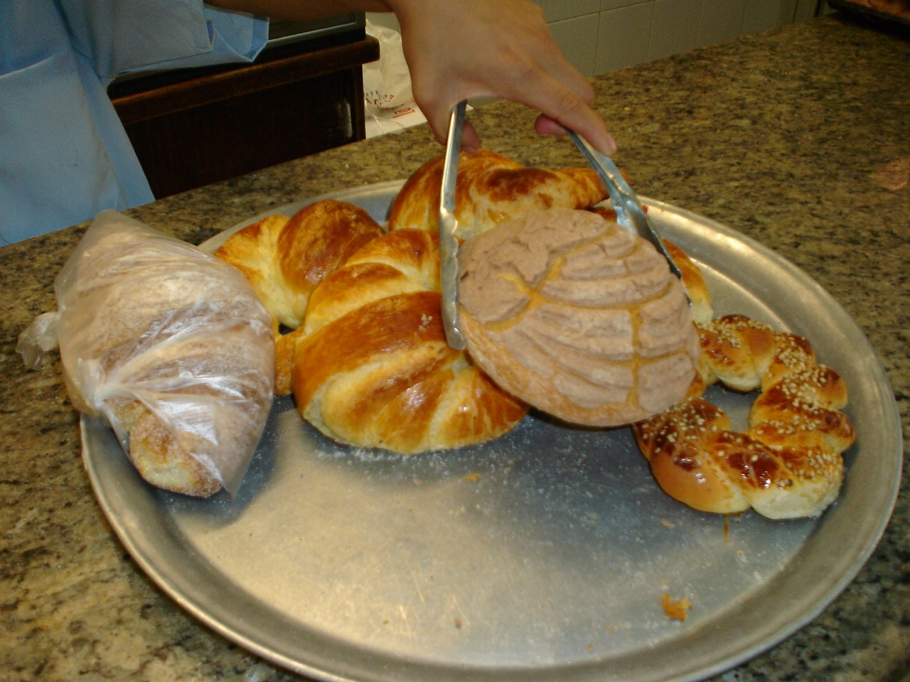 PAN EN MEXICO Date:16 12 2006